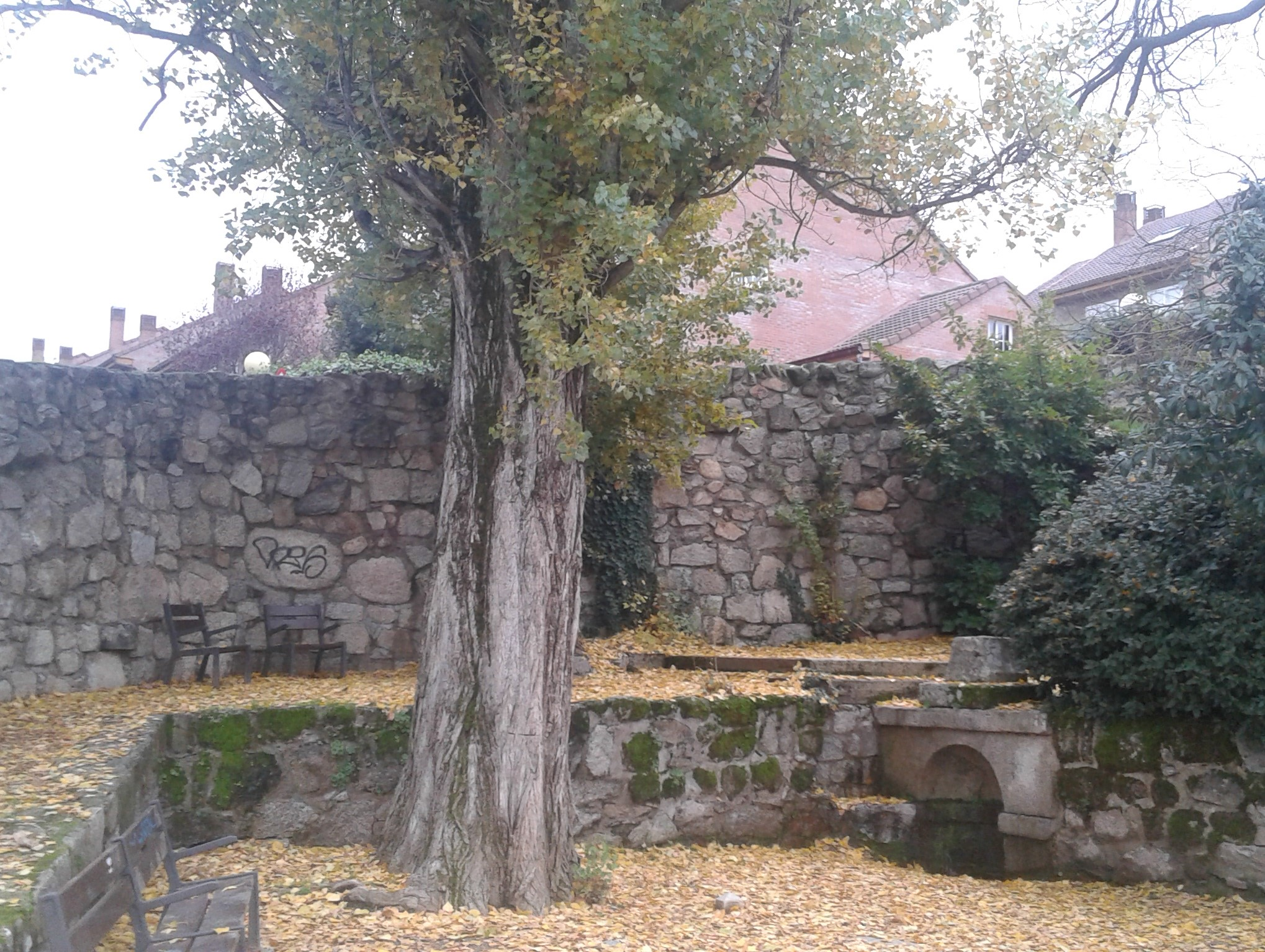 Fuente del caño viejo y chopo centenario catalogado